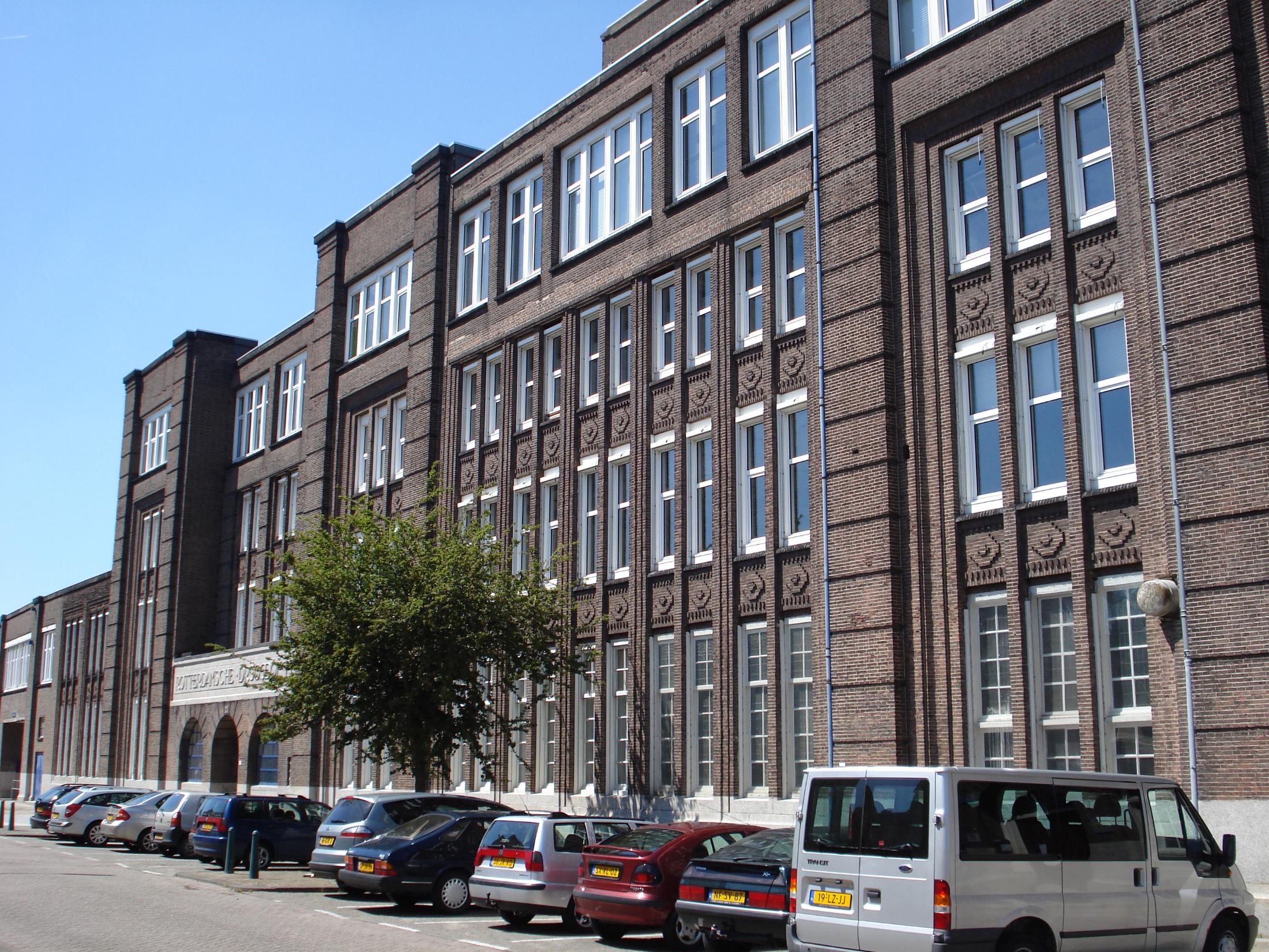 Rotterdam, Heijplaat. Kantoor Rotterdamse Droogdokmaatschappij (RDM).